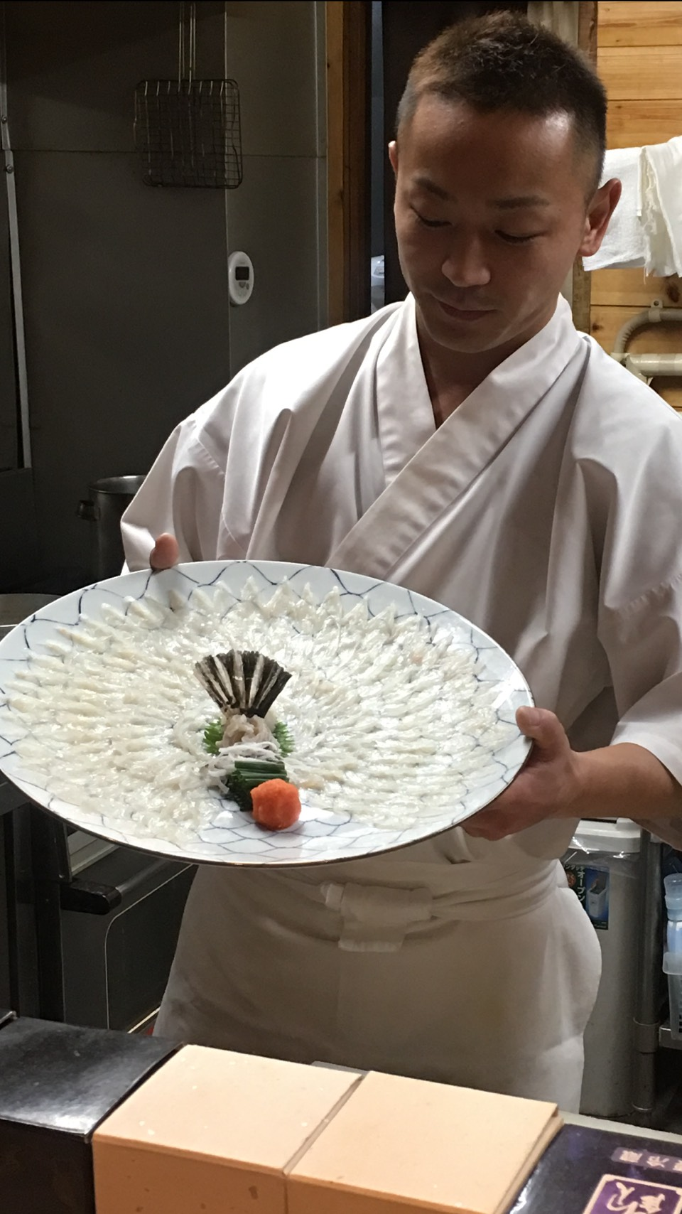 フグの薄造りと店主